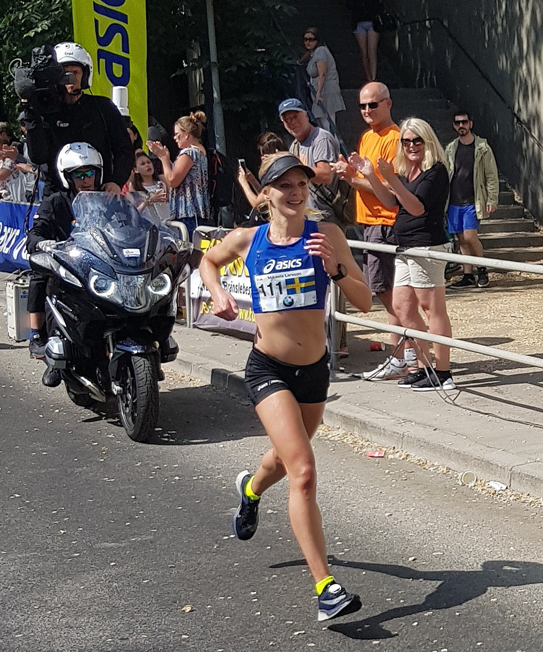 Mikaela vid norr mälarstrand varv 2. Winner in Stockholm Marathon 2018.